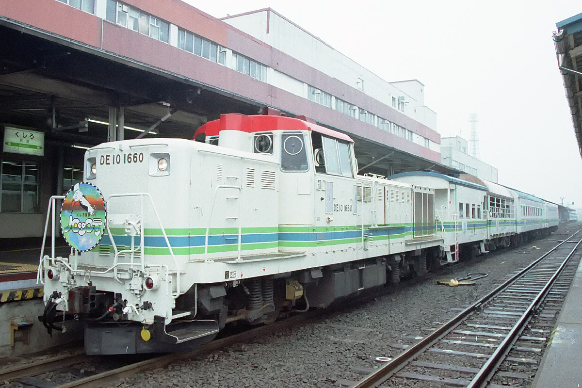 1997年7月23日撮影 釧路にて